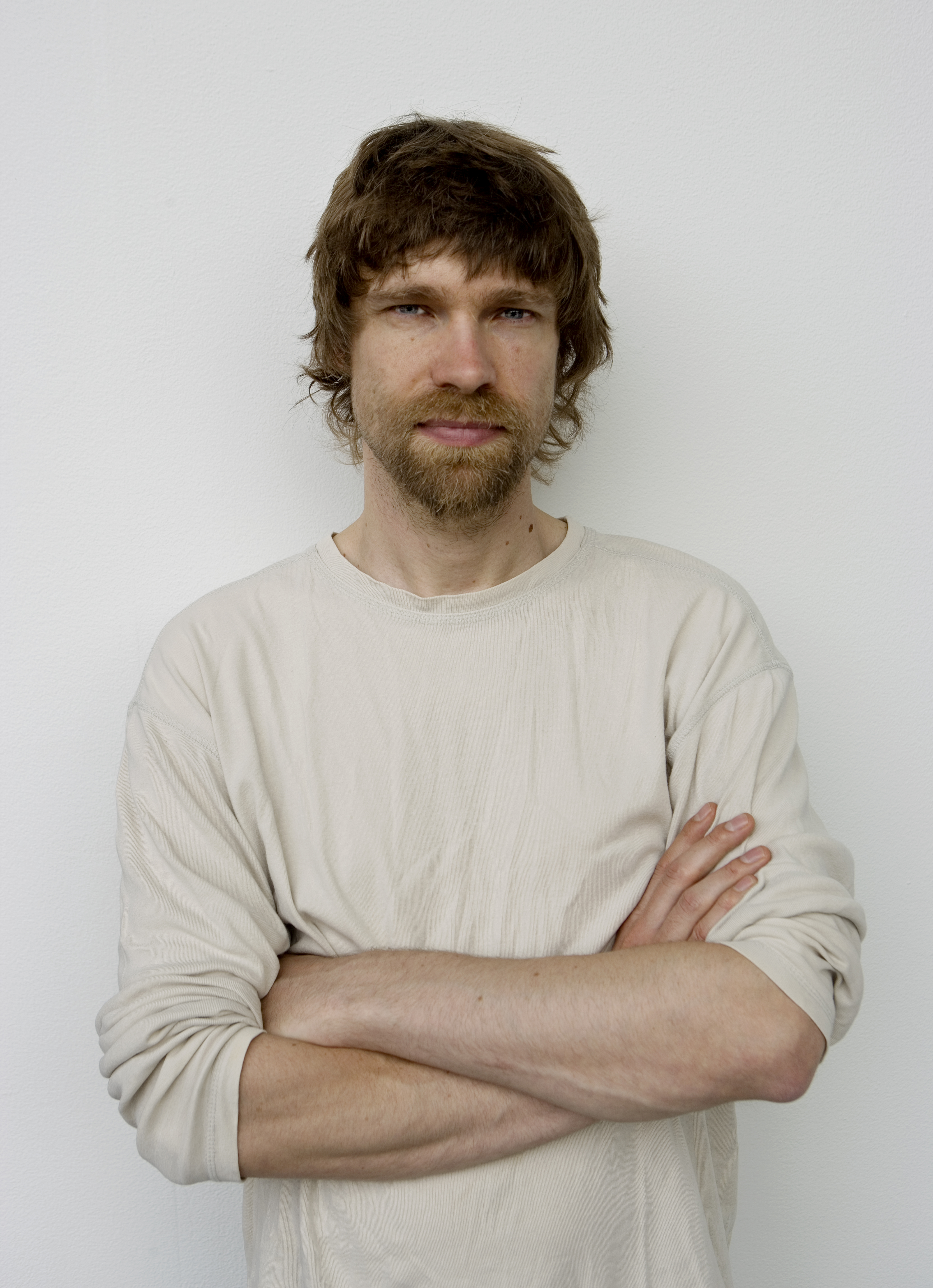 ARS Fennica 2007, Kiasma, 14.10.2006 – 21.1.2007, 4. ja Viides kerros, kuvassa taiteilija Markus Kåhre